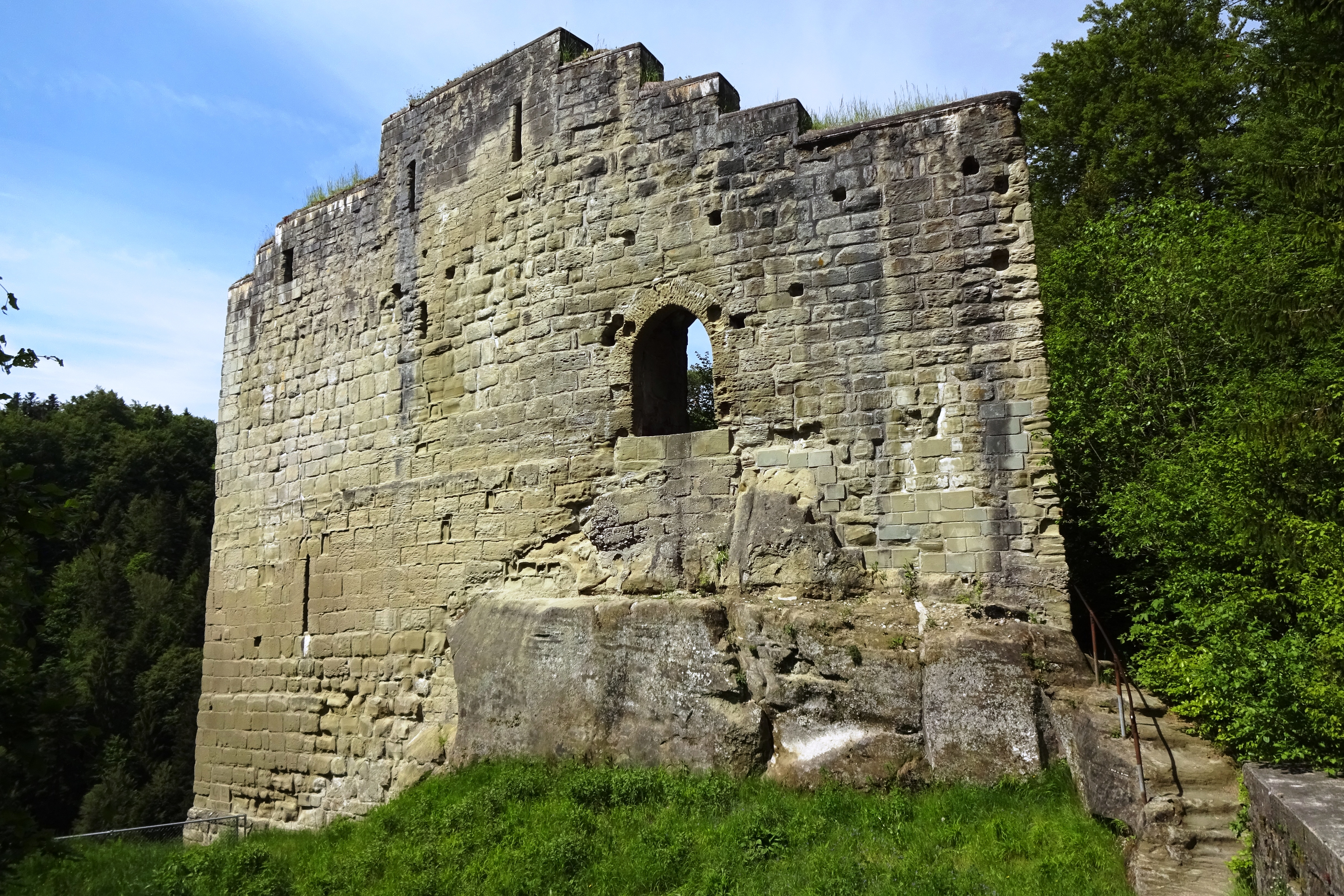 Naturpark Gantrisch (Nr. 1011P) – Grasburg (Sensegraben, Schwarzenburg BE) Hinterburg : Palas mit Burggraben von Nordosten